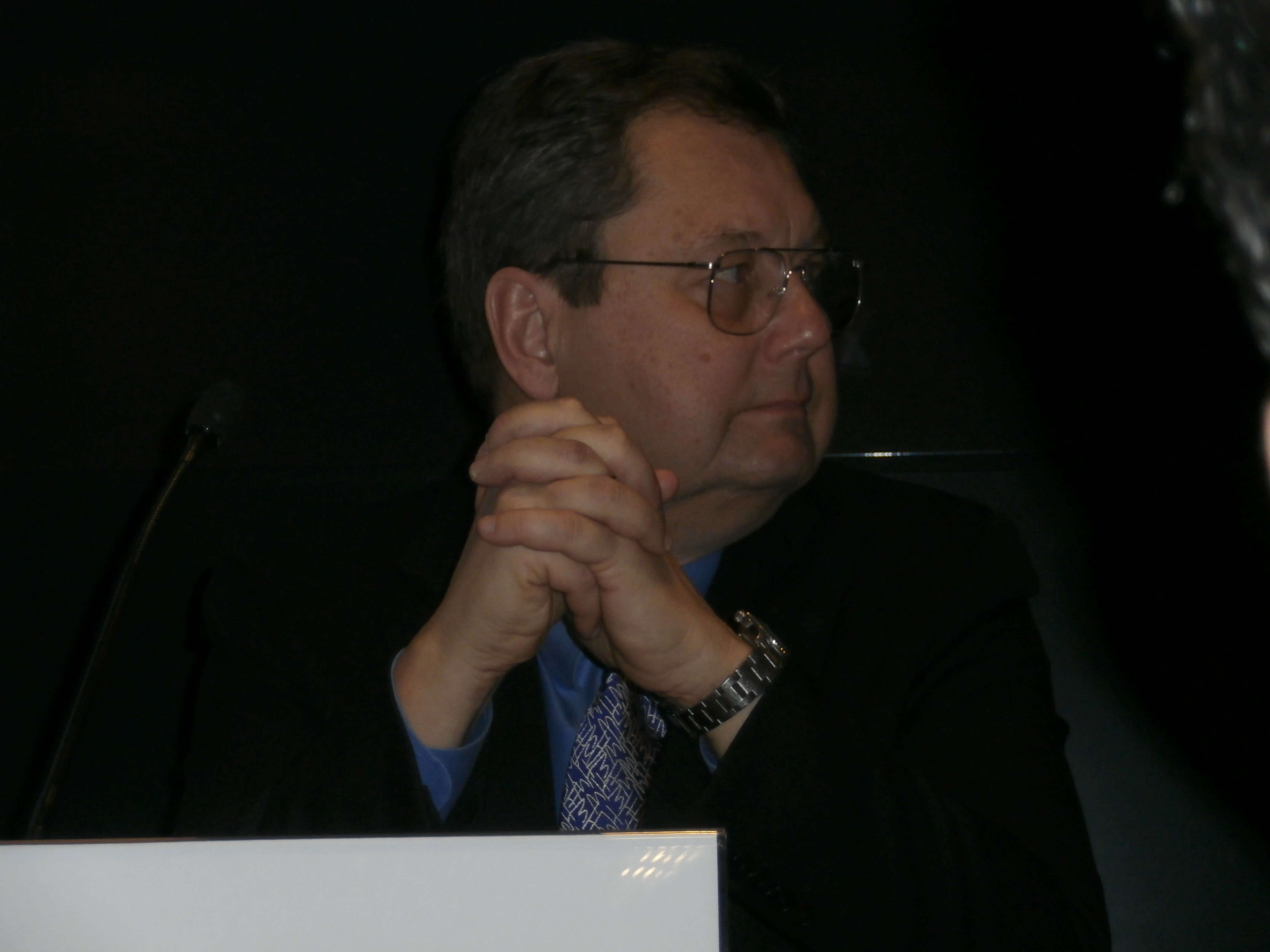 Paul V. Mockapetris a Barcelona